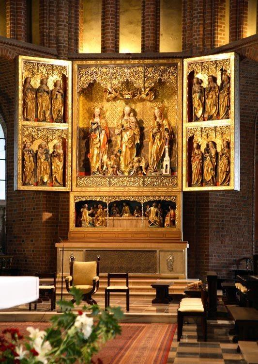 Polska